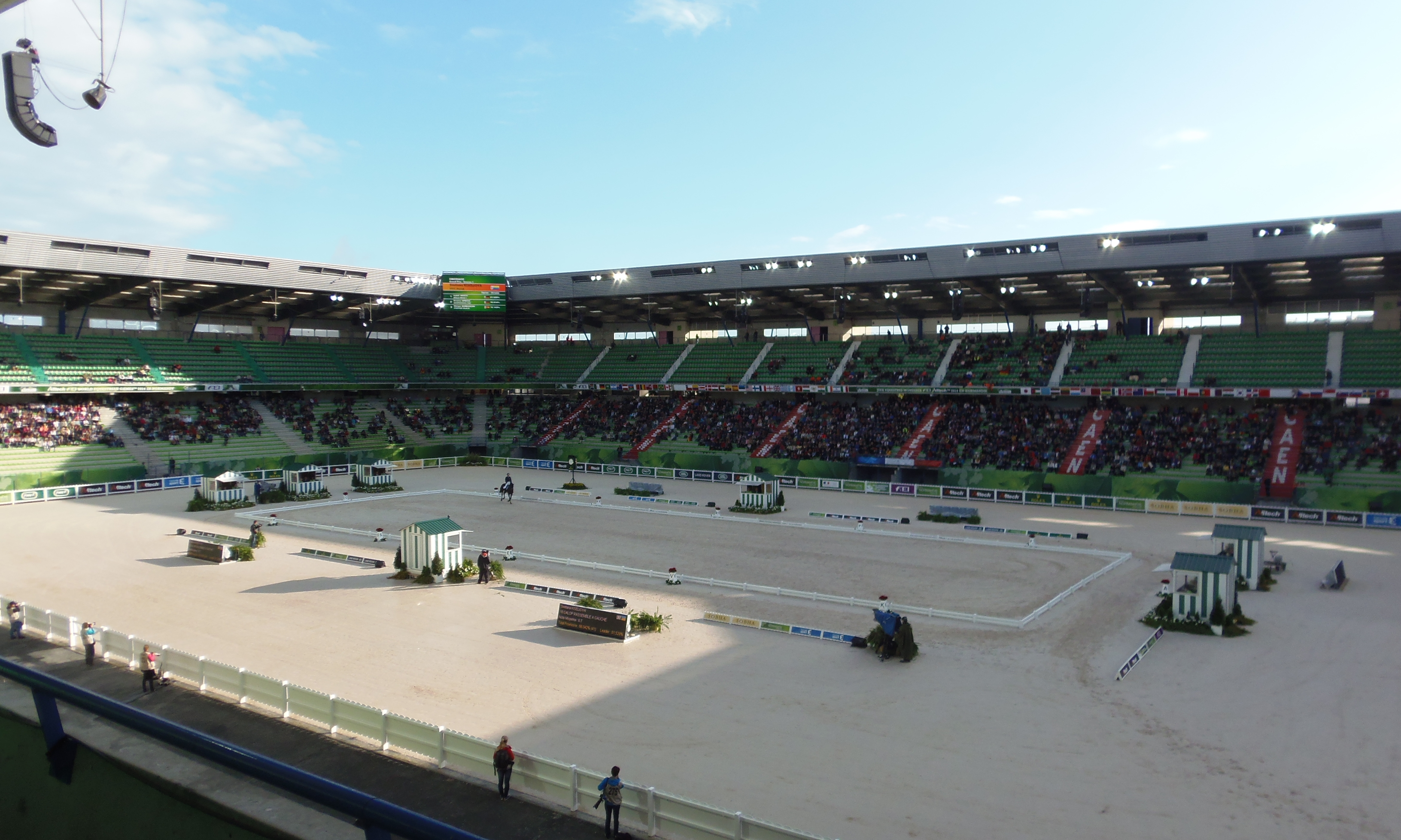 La carrière installée sur la pelouse du stade d'Ornano à Caen (Normandie, France) parcourue par Svetlana Kiseliova en selle sur Parish lors des Jeux équestres mondiaux, le 26 août 2014.